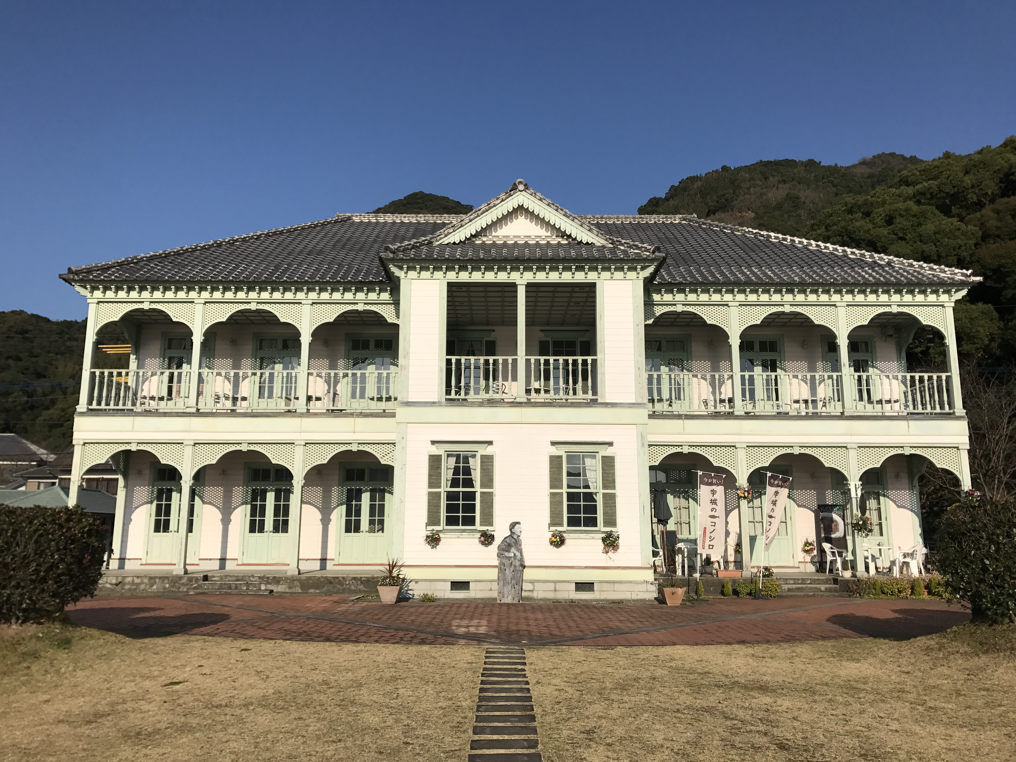 三角西港・浦島屋